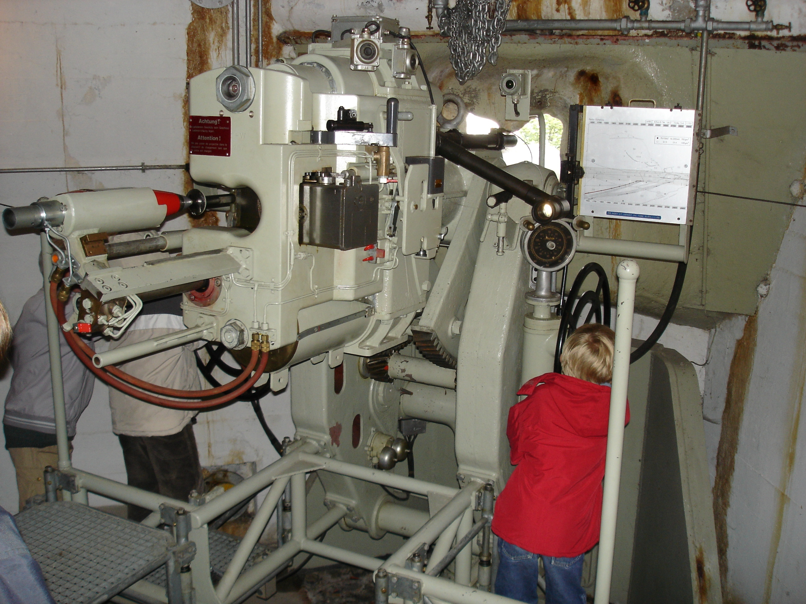 Fort Cindey St. Maurice. Ansicht Rechts Panzerabwehrkanonne 10,5cm Fort Cindey